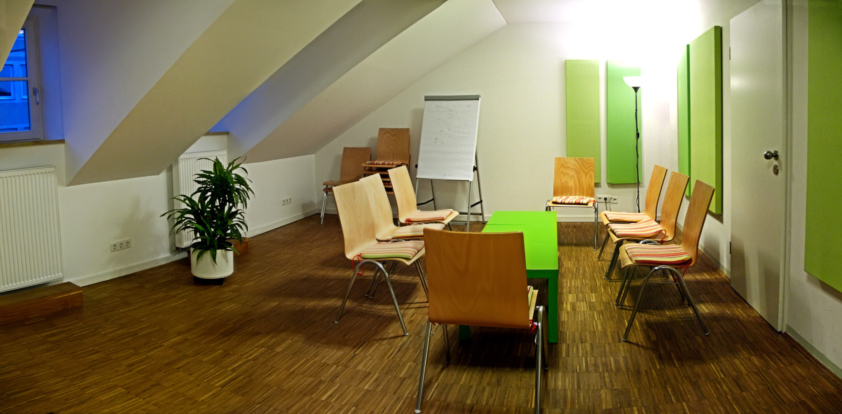 Typischer Gruppenraum für eine Selbsthilfegruppe (Selbsthilfezentrum München Raum G1)